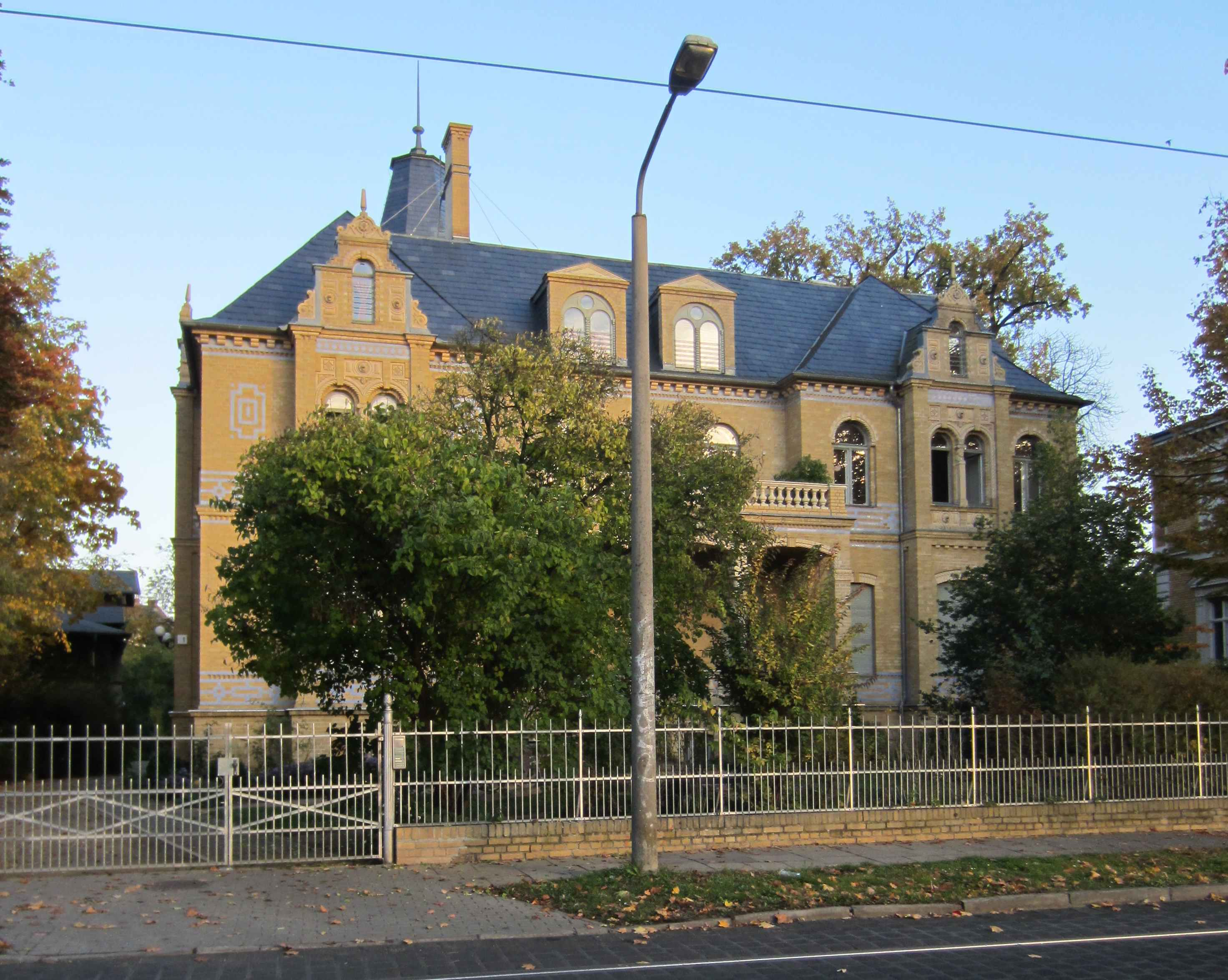 Denkmalgeschützte Villa in Potsdam, Puschkinallee 11